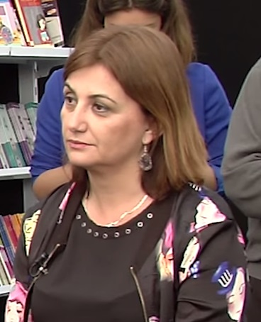 Carmen Amoraga, 2015.